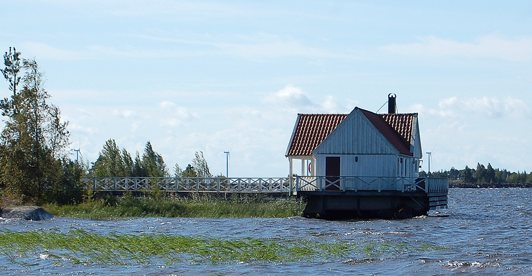 Badhuset vid Stora Ensos herrgård Udden.